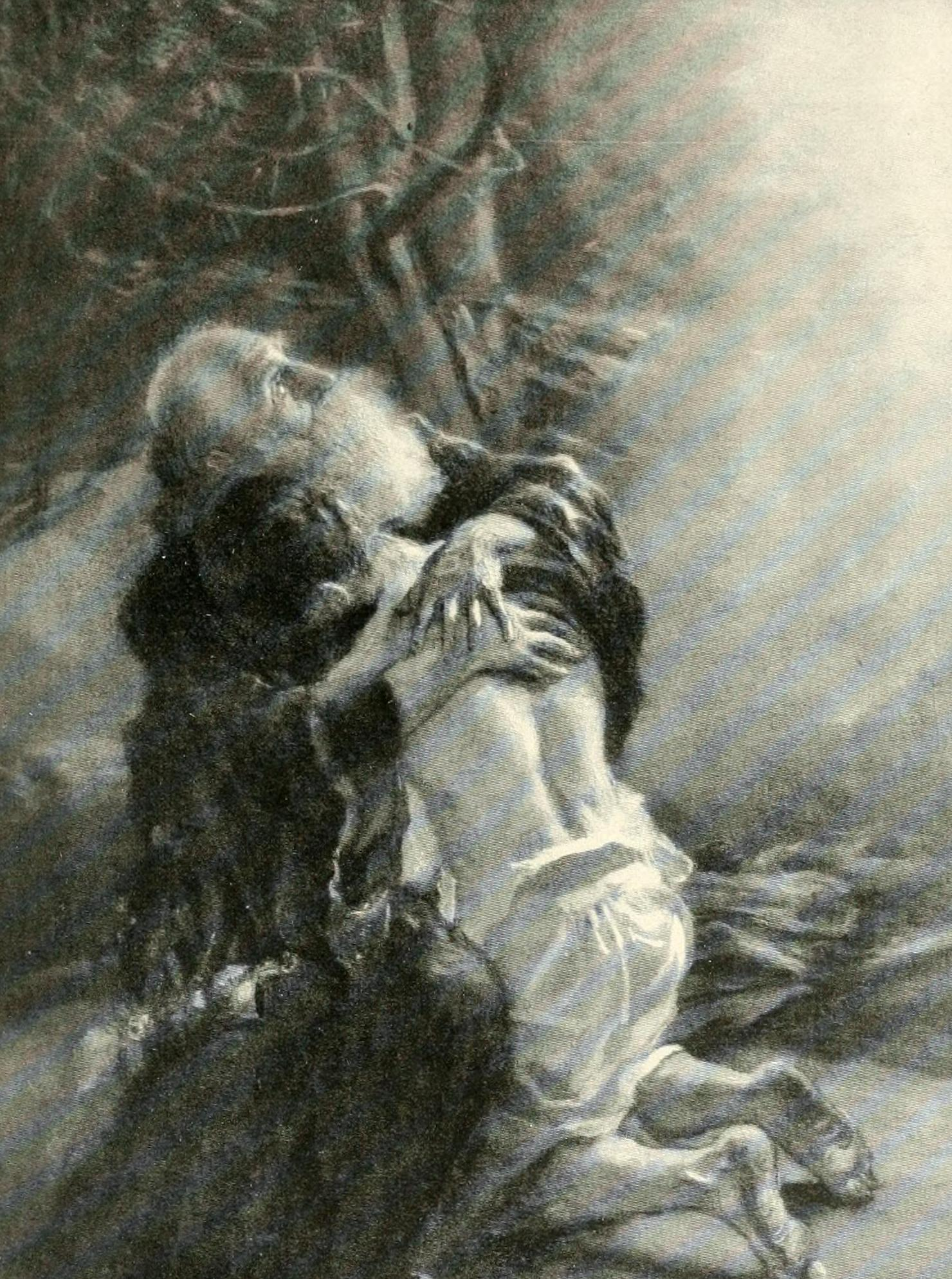 Die Prüfung Abrahams